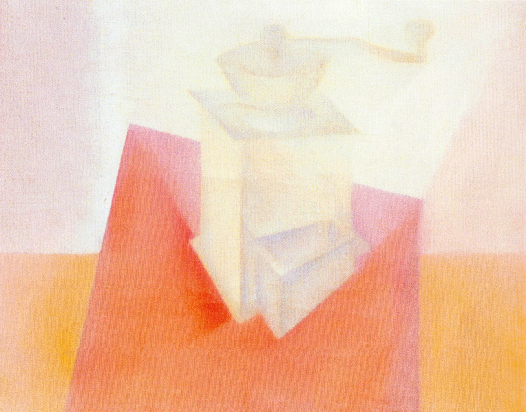 Natură statică - 50/30, ulei pe pânză, 1976